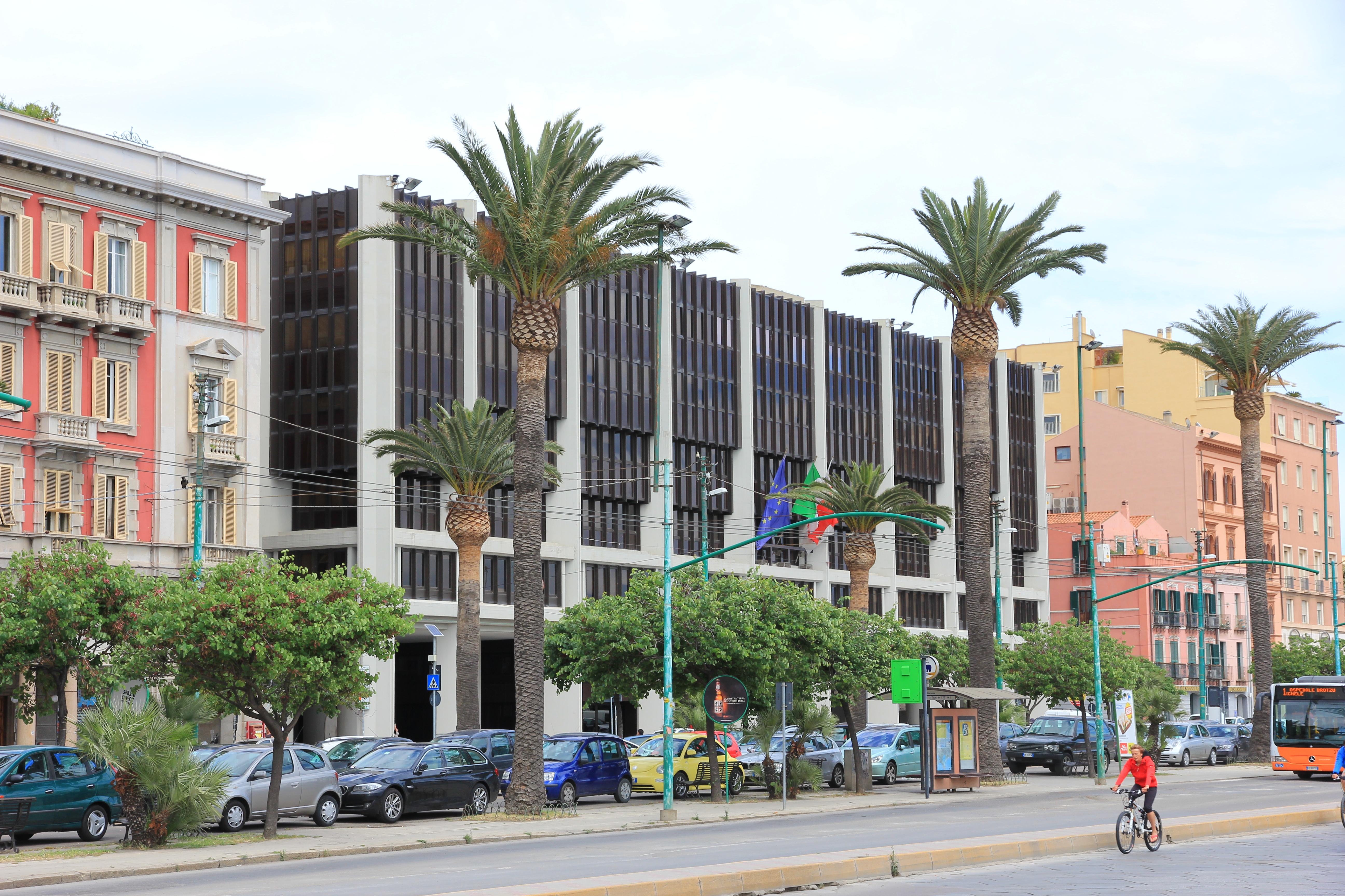 Cagliari - Palazzo del Consiglio regionale